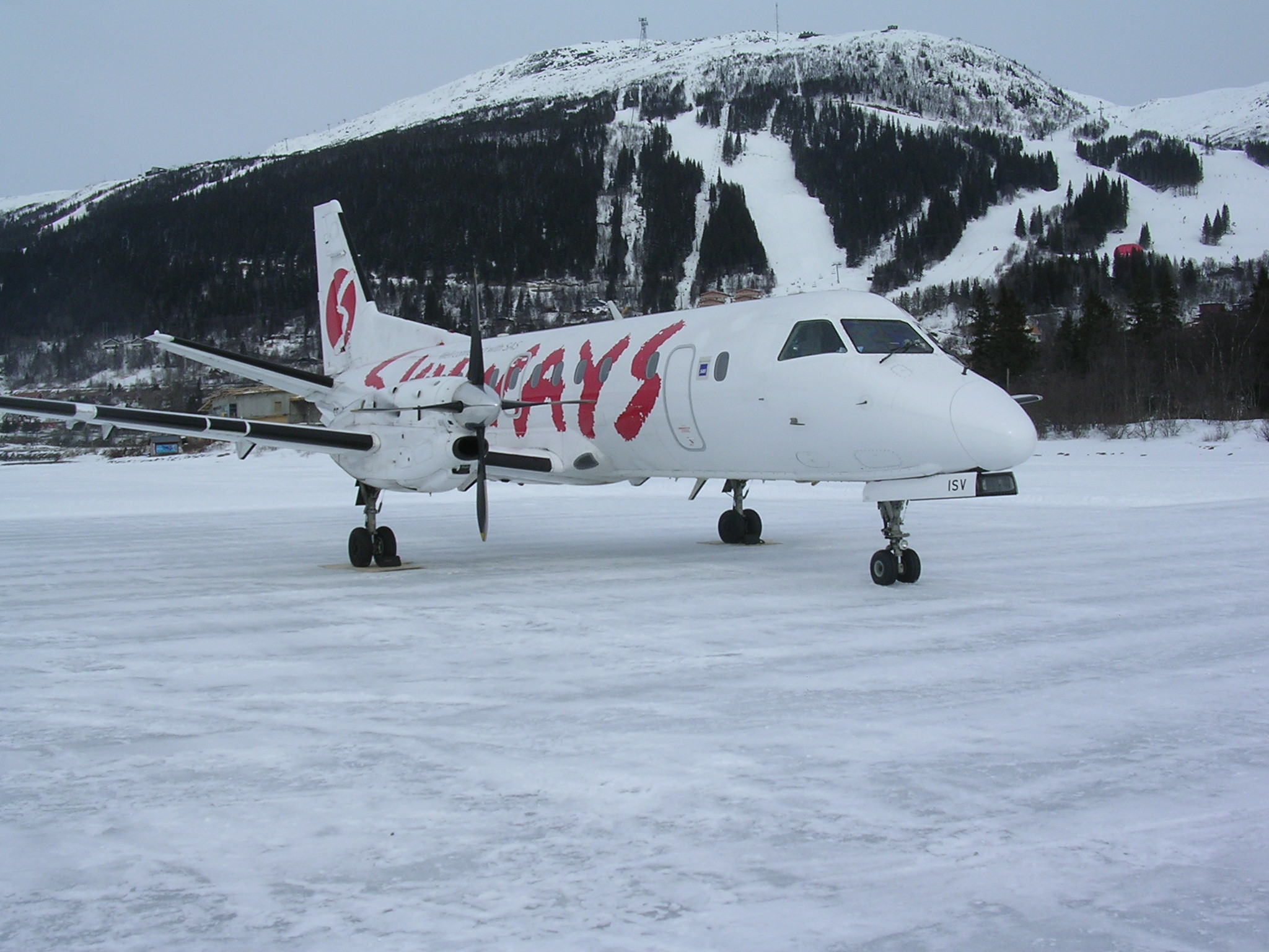 SAAB SF340A på Åresjön